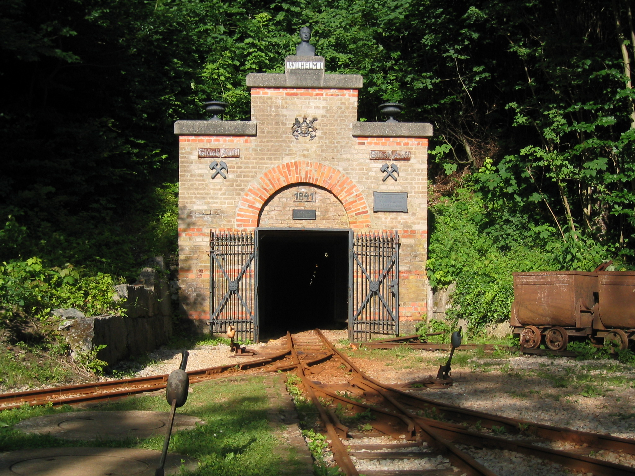 Eingang Besucherbergwerk Tiefer Stollen in Aalen-Wasseralfingen, Baden-Württemberg.